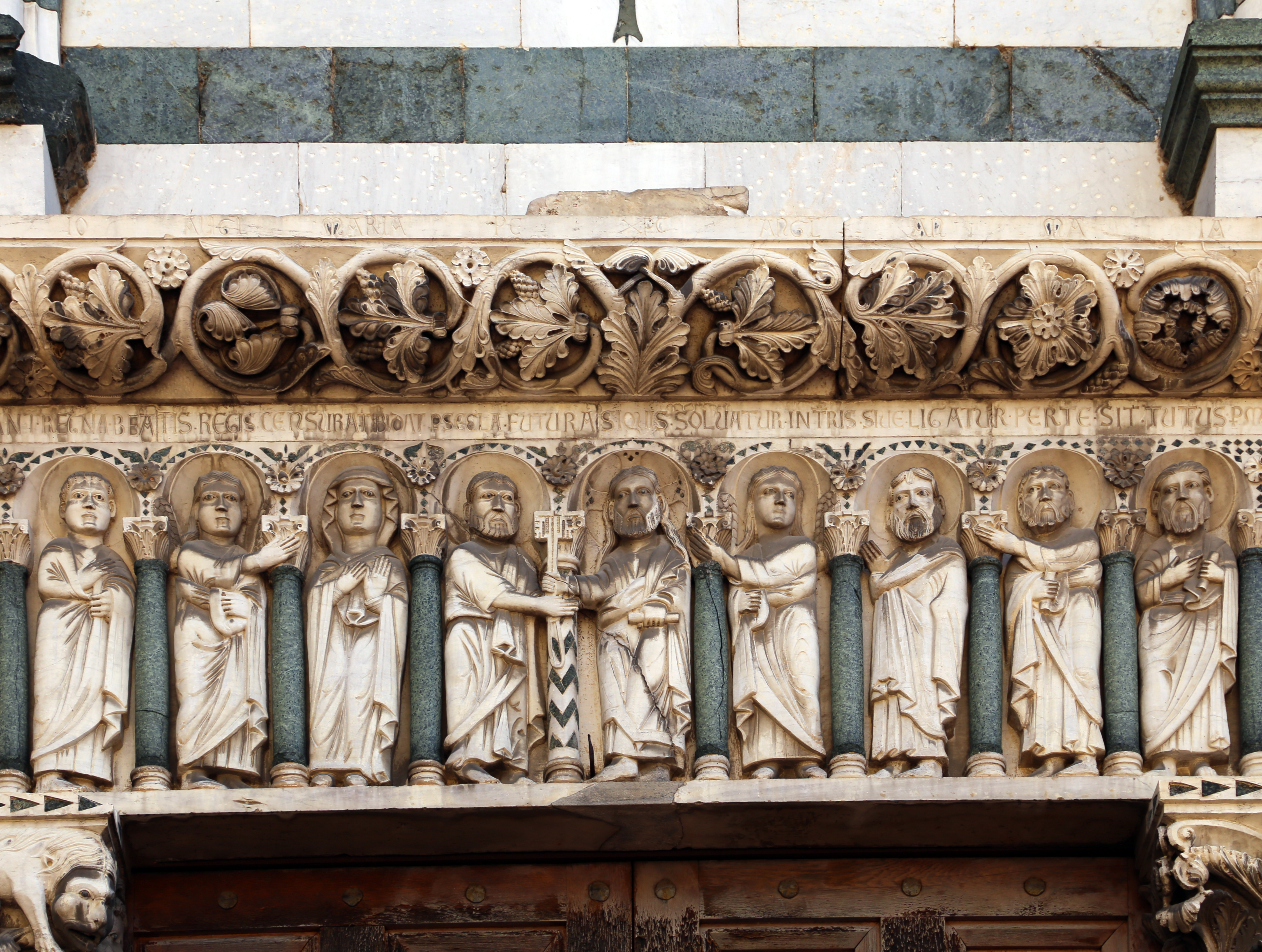 Chiesa di San Pier Maggiore This is a photo of a monument which is part of cultural heritage of Italy.